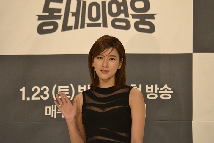 최윤소 Choi Yoon-so OCN드라마 '동네의 영웅' 제작발표회장 (2016)